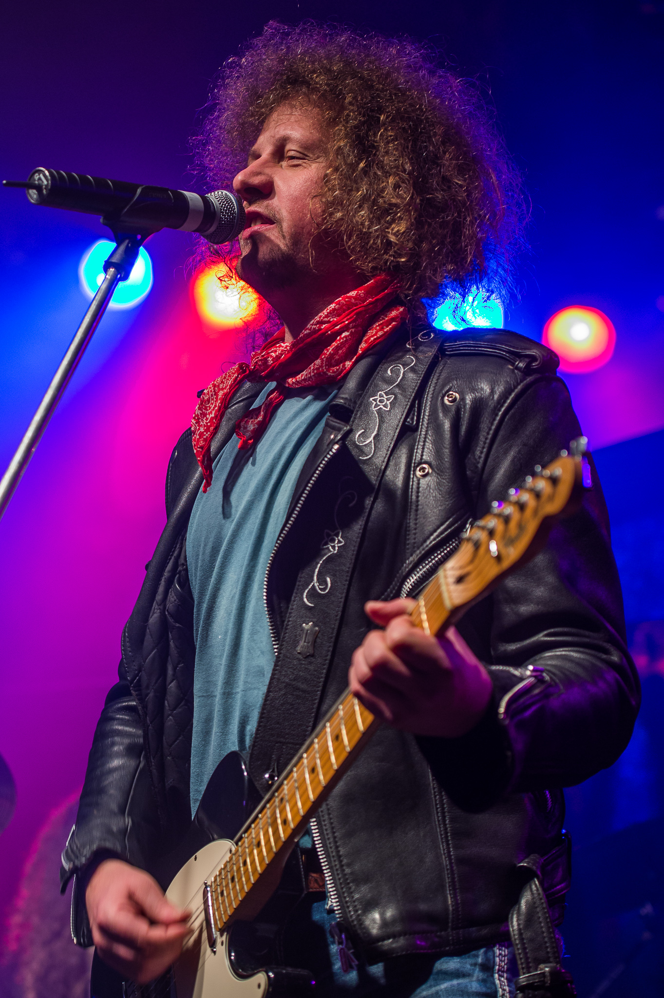 Luke Gasser beim Auftritt der Luke Gasser-Band am 6. Dezember 2016 im Der Hirsch in Nürnberg.